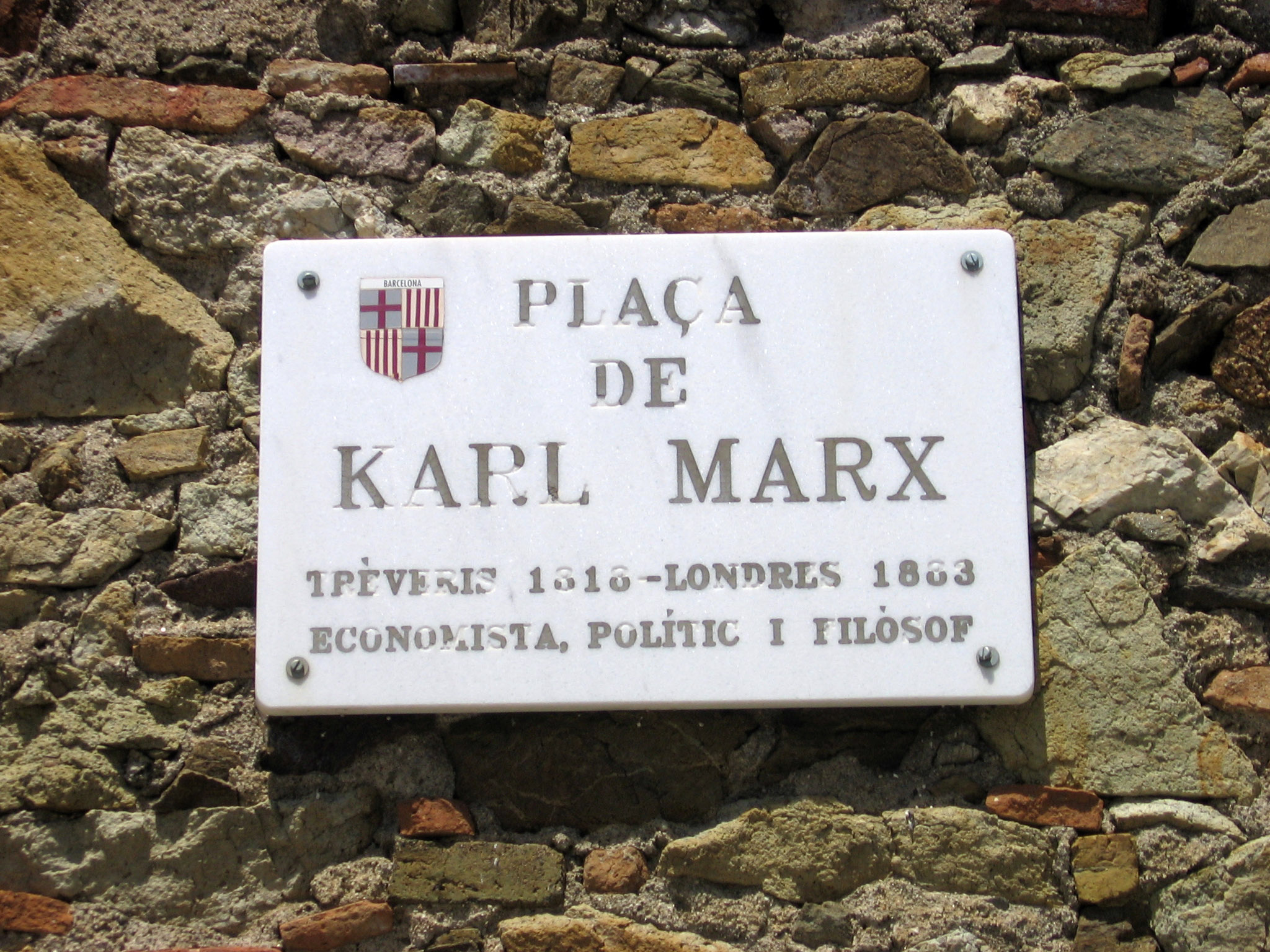 Plaça de Karl Marx.